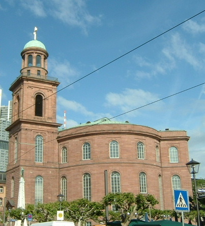 Paulskirche in Frankfurt/Main Frankfurter Paulskirche